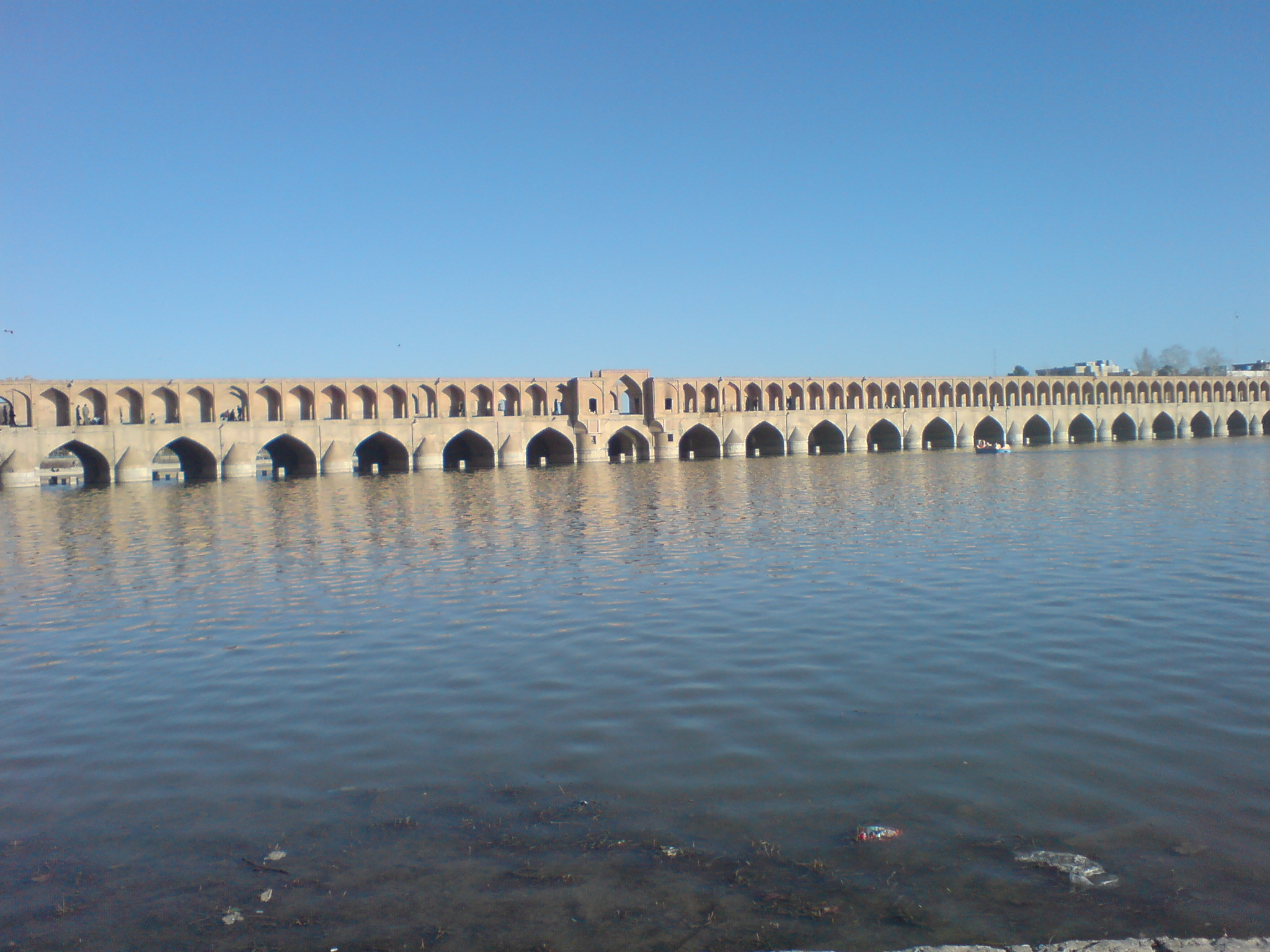 نمایی از سی و سه پل